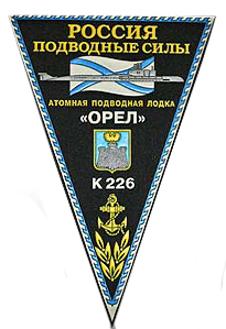 вымпел К-266 "Орёл"